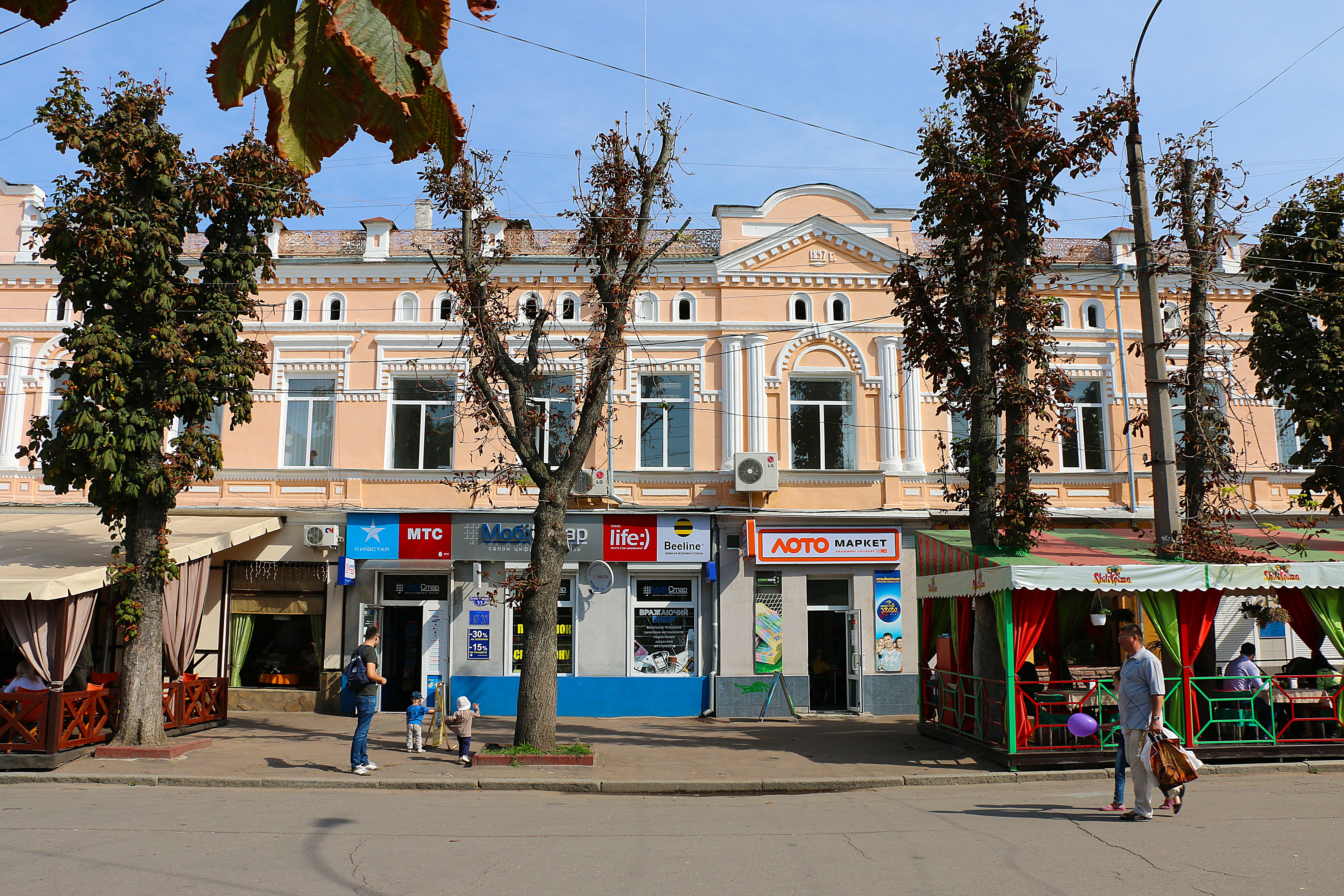 Торговий дім (мур.), Хмельницький, вул. Проскурівська, 33